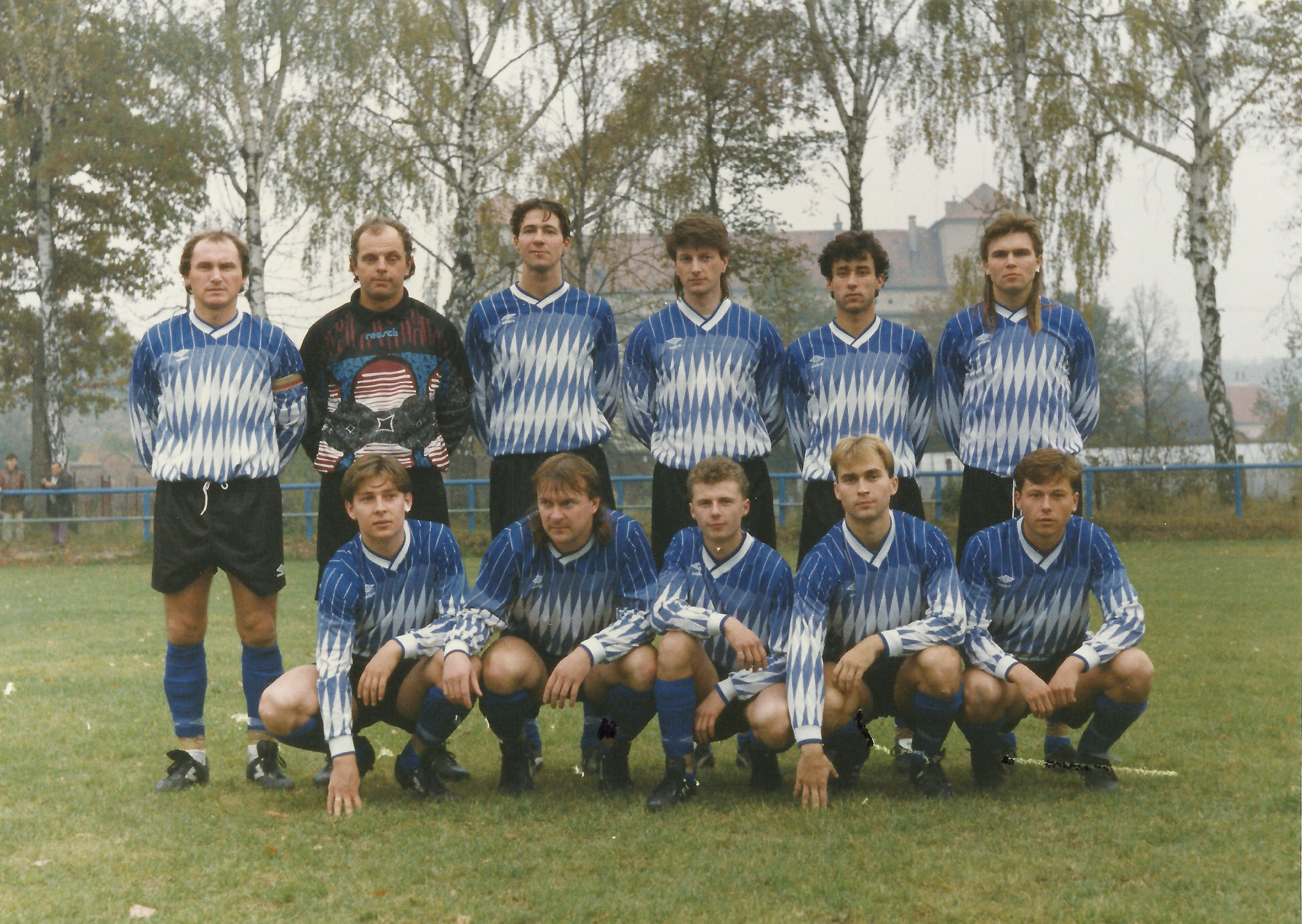 Tým FC REKOS Hustopeče (I. A skupina Jihomoravské fotbalové župy 1995-1996) v Bučovicích dne 29. října 1995 při zápase s TJ Bučovice. Stojí: Ivan Konečný, Jindřich Duchoň, Otto Cibula, Petr Fibinger, David Poláček, Zdeněk Masařík. Klečí: Robert Polzer, Karel Fabiánek, Libor Slavík, Pavel Rotter, Jaroslav Šebesta.